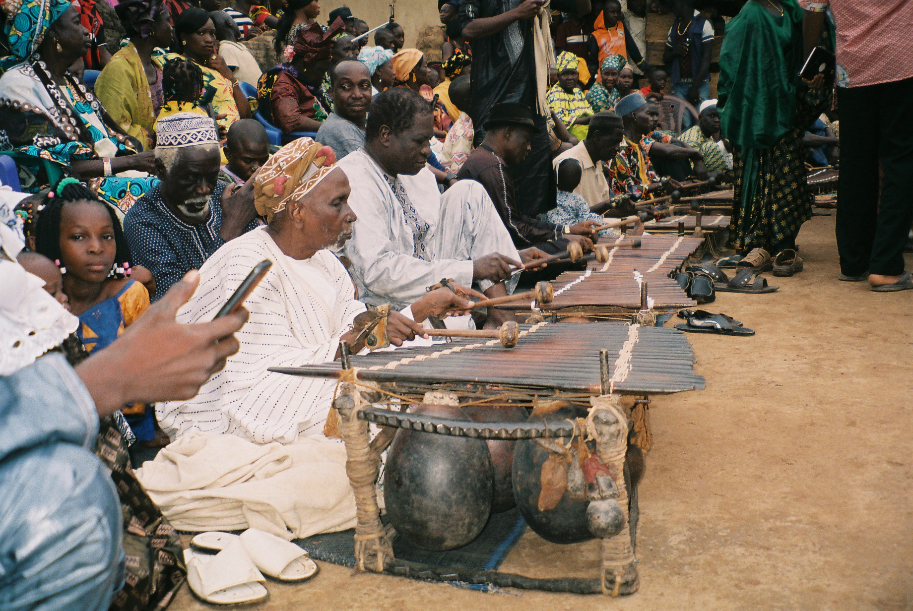 2017 spielt der derzeitige Wächter des Sosso Bala, El Hadji Sékou Kouyaté das original erhaltene Instrument in einer feierlichen Zeremonie.